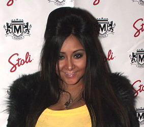 Nicole "Snooki" Polizzi attending a party in Chicago